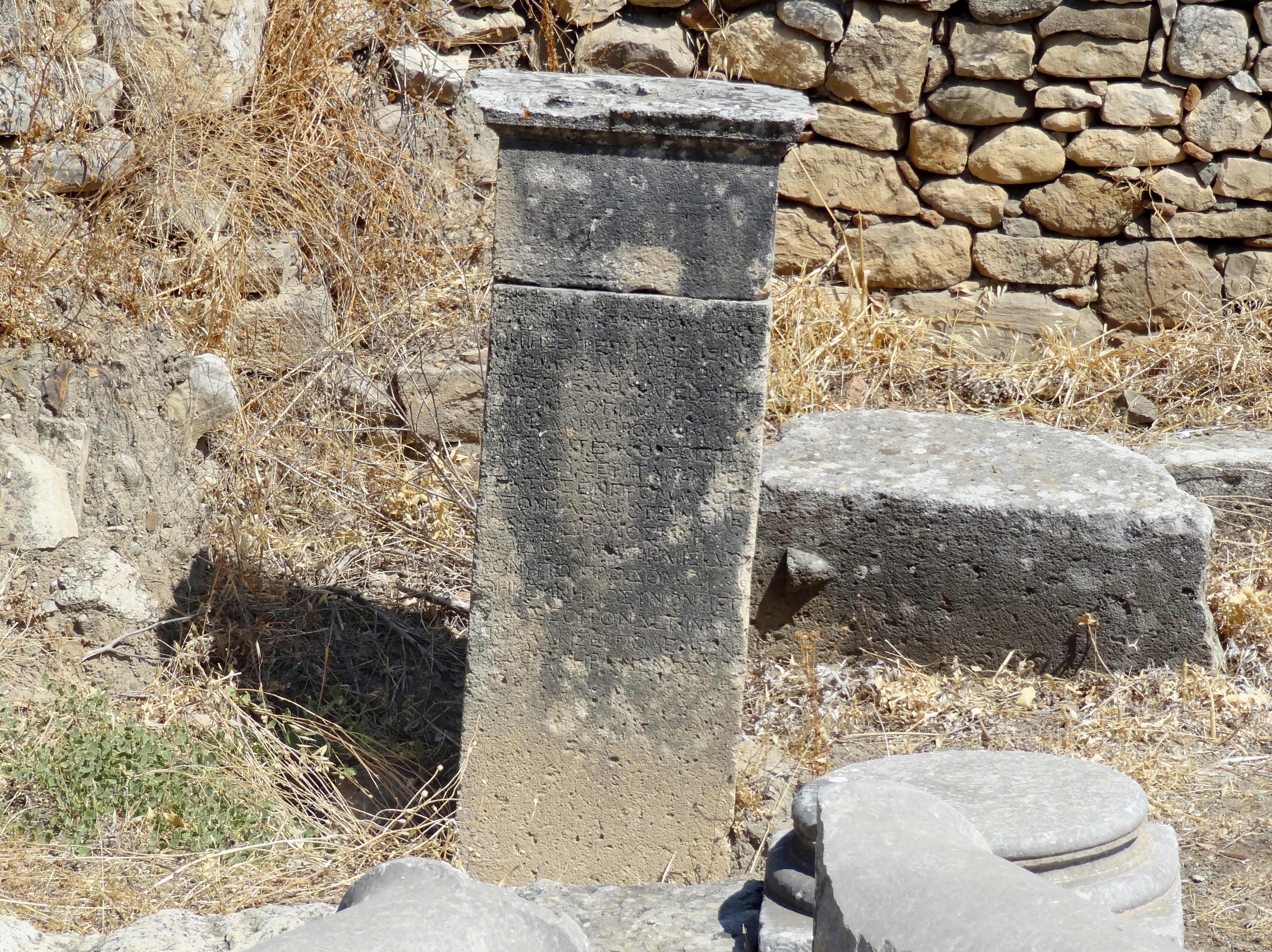 Reste der griechisch-römischen Stadt Gortyn (Γορτύν), Gemeinde Gortyna, Regionalbezirk Iraklio, Kreta, Griechenland